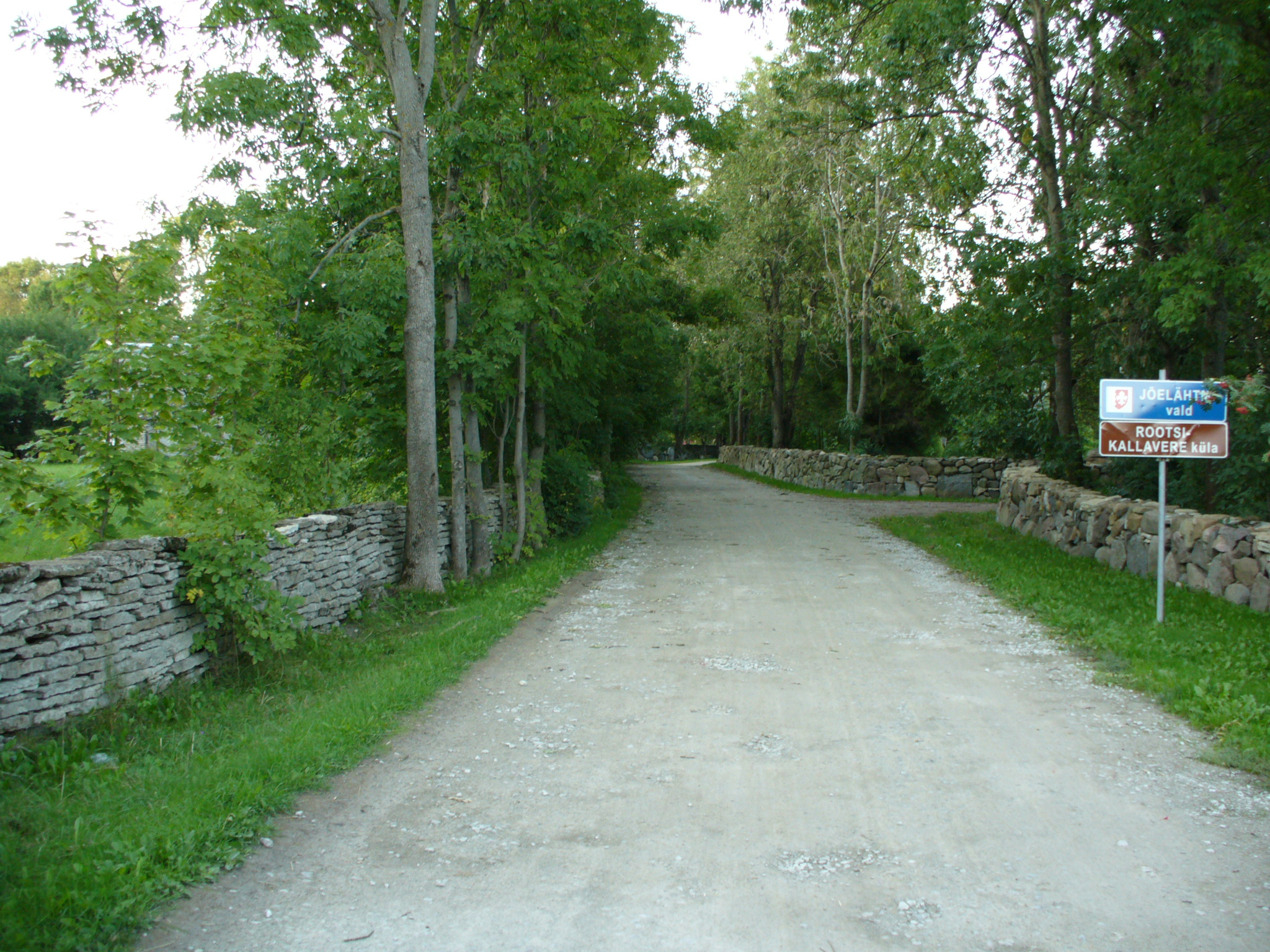 Rootsi-Kallavere külatänav (osa Kallavere külast).